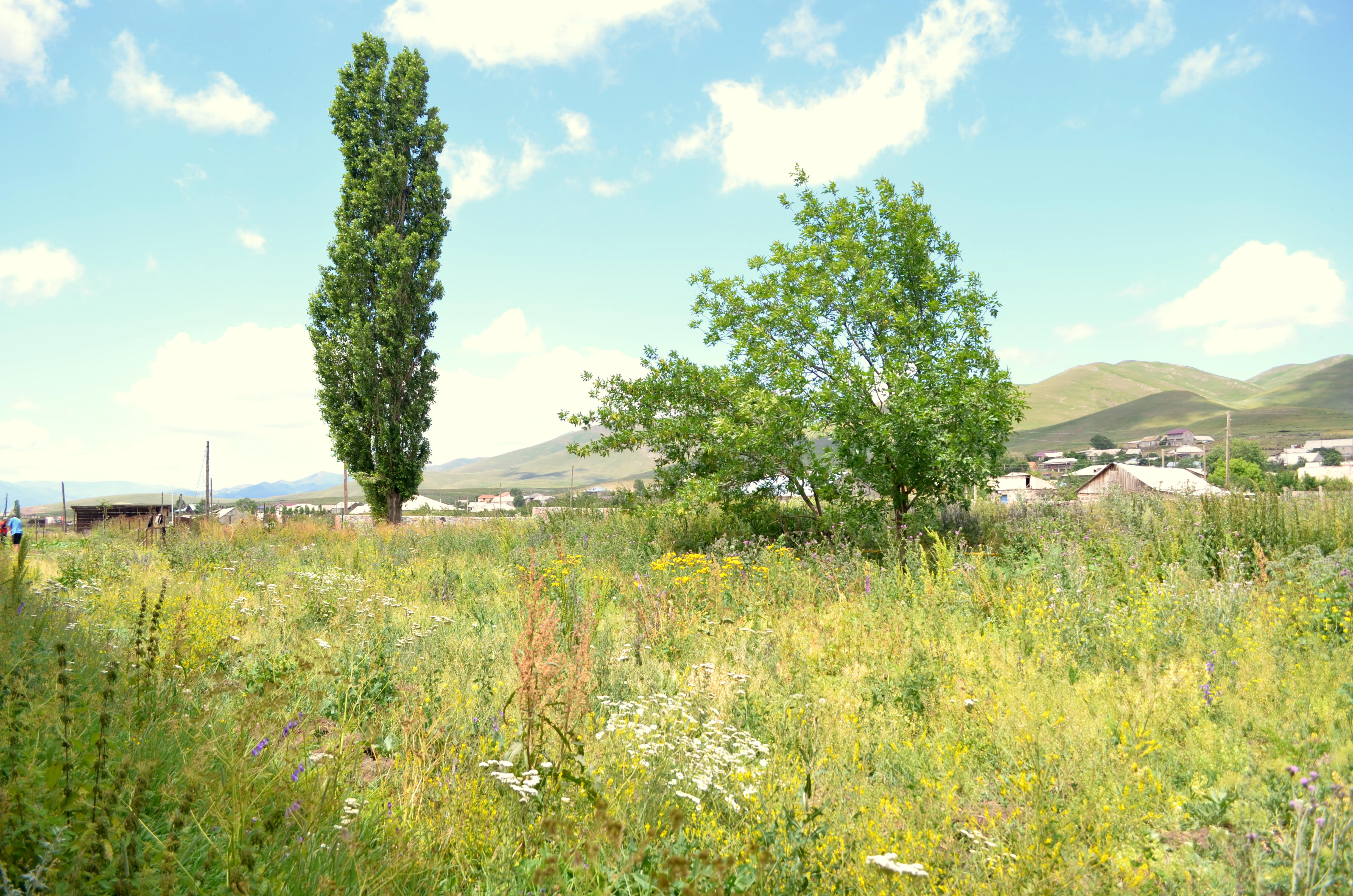 Ծաղկունքի բնությունը